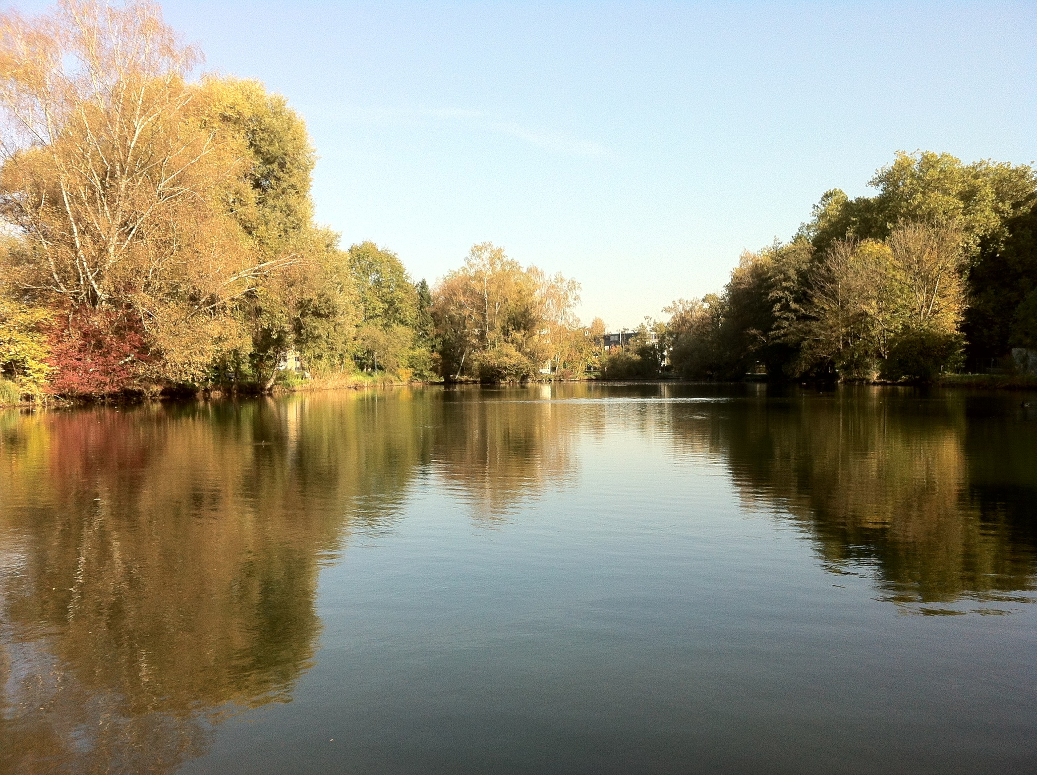 Zellwegerweiher in Uster (Schweiz)